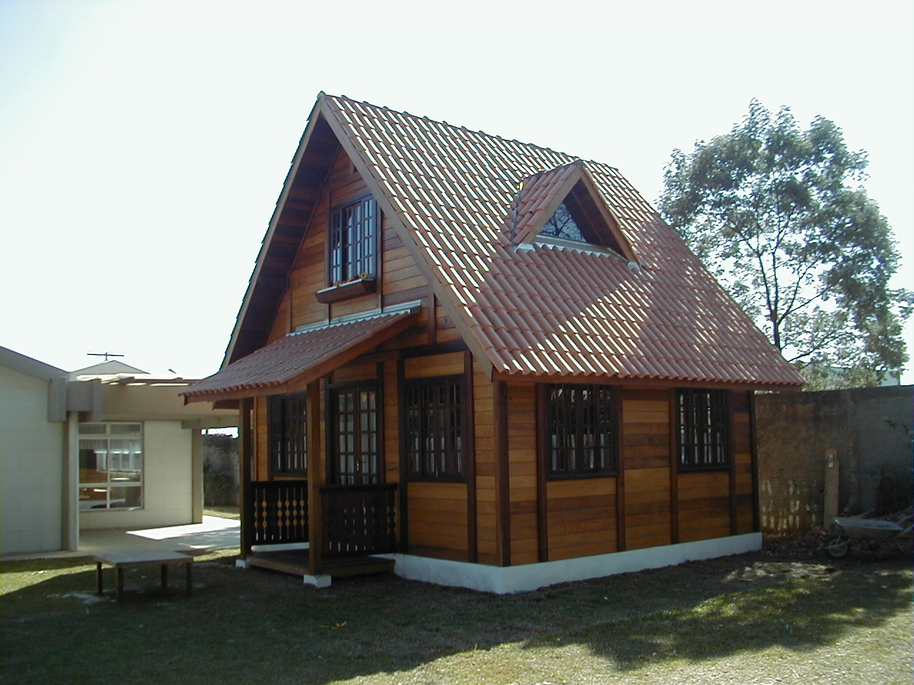 Das Chalet der Schweizerschule Curitiba steht Kindern im Kindergarten zur Verfügung.